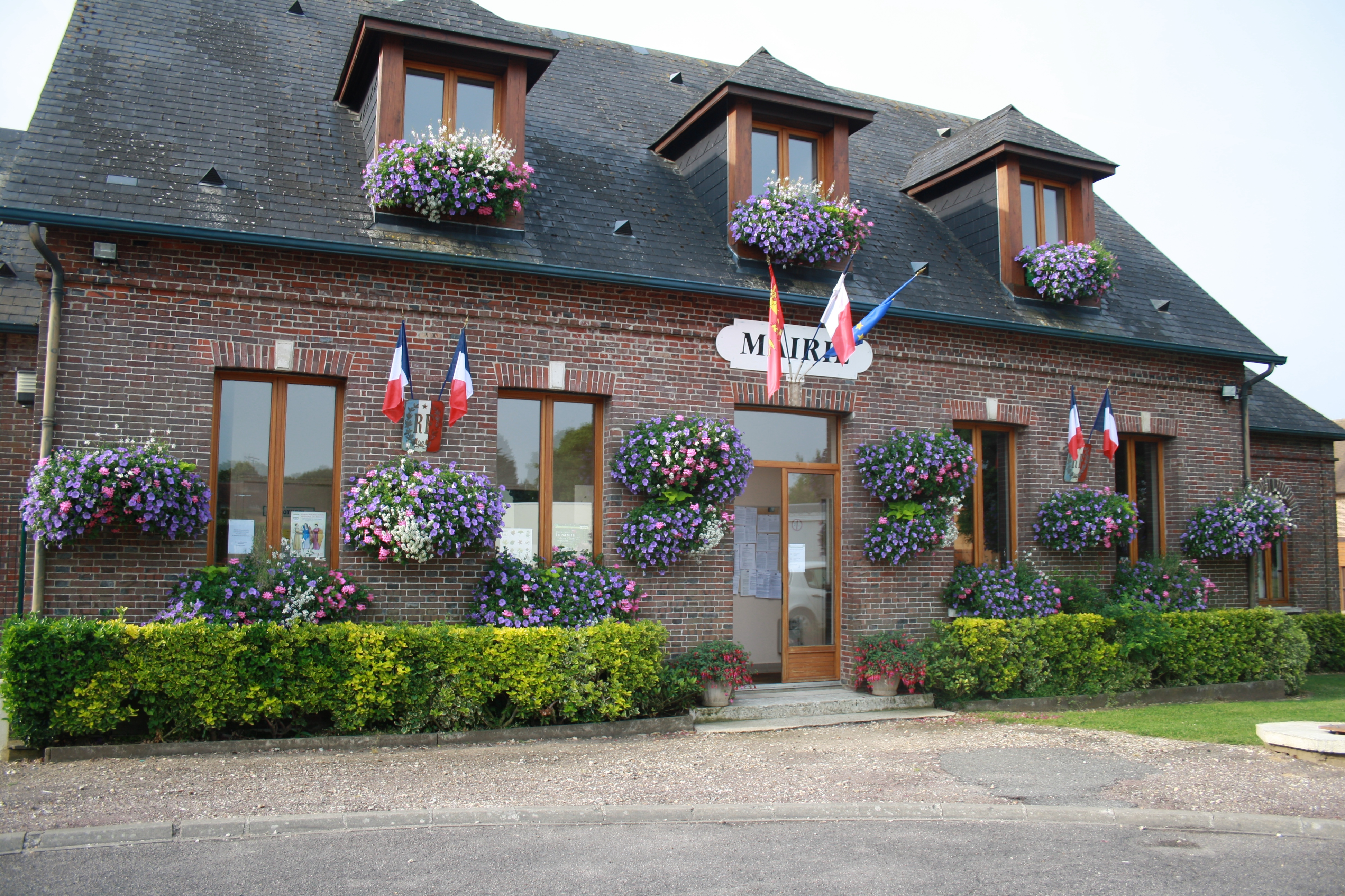 Mairie de la commune de Cierrey en Normandie